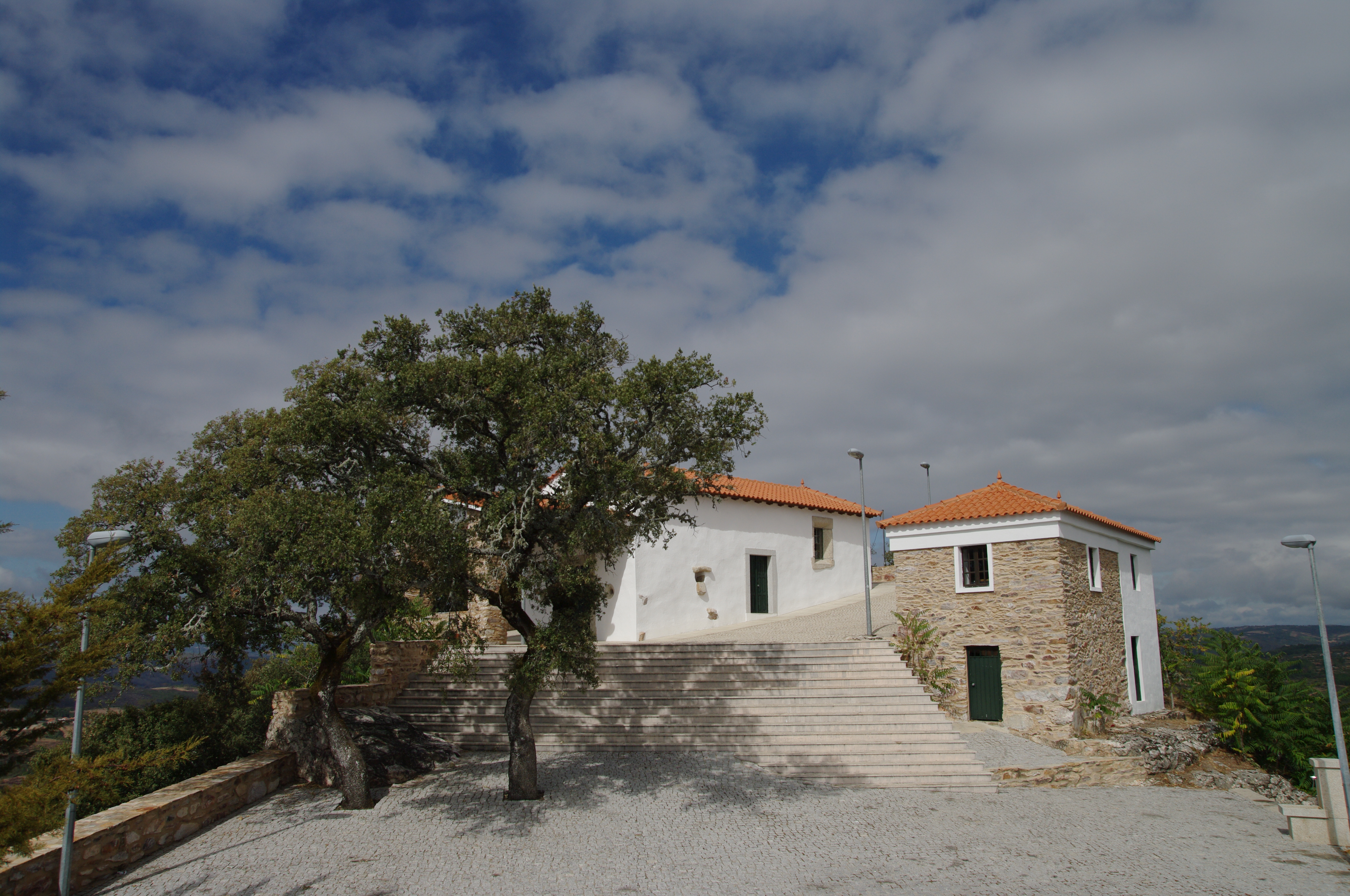 Capela de Nossa Senhora da Saúde, Vale de Janeiro, Vinhais, Portugal. 2017.